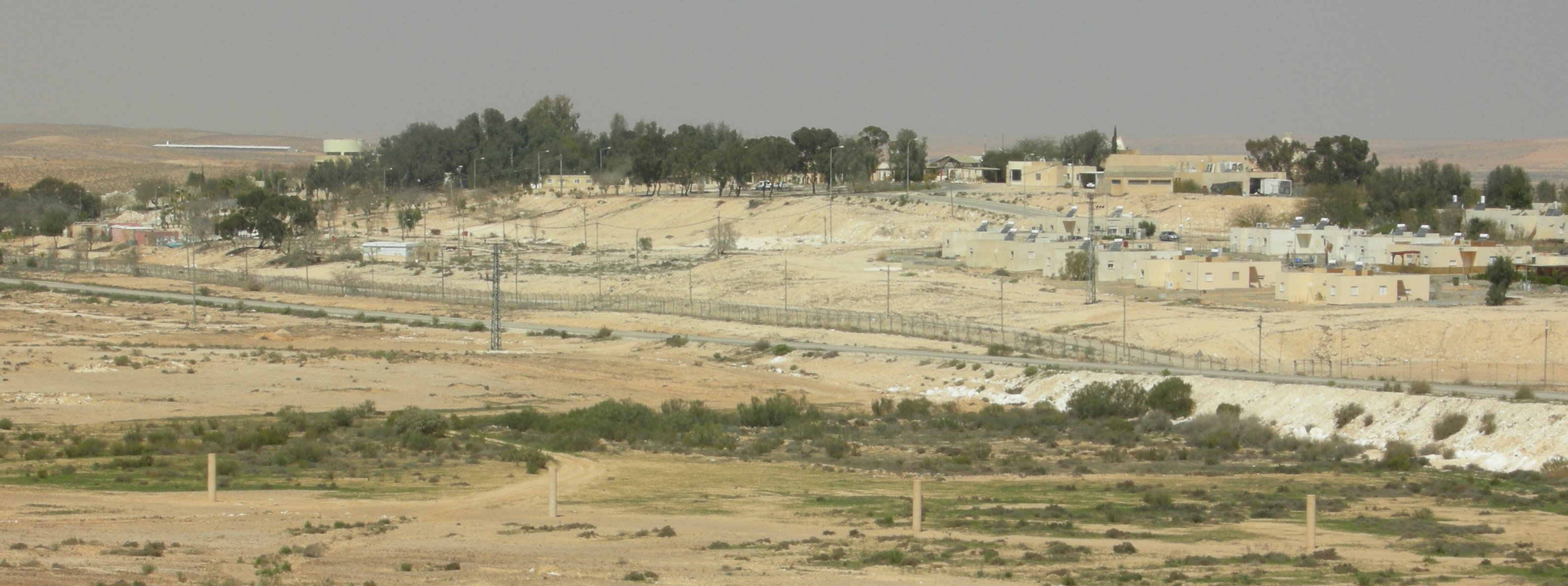 Nizana village, Israel